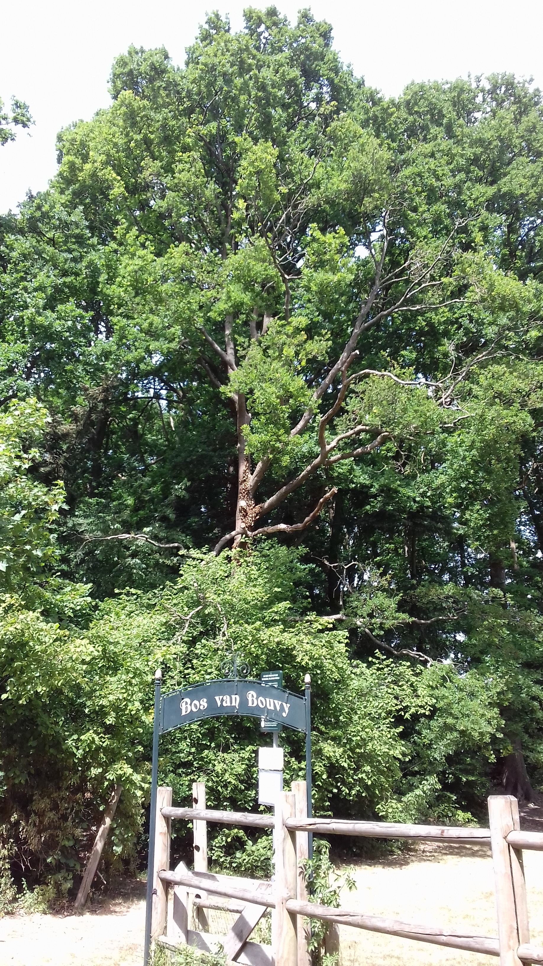 Foto genomen in 2020, restant van het laatste stukje Bos van Bouvy